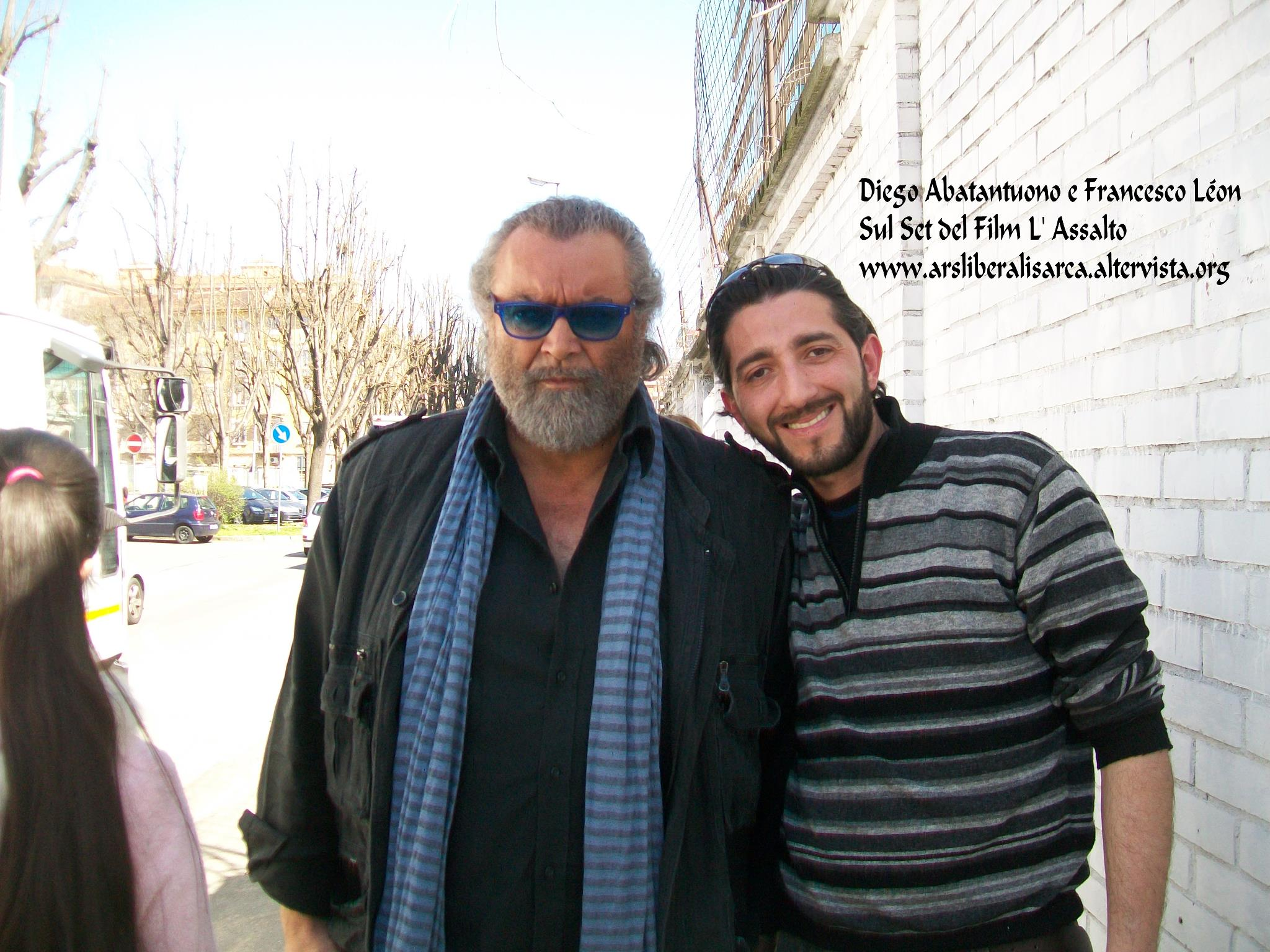 Francesco Léon e Diego Abatantuono